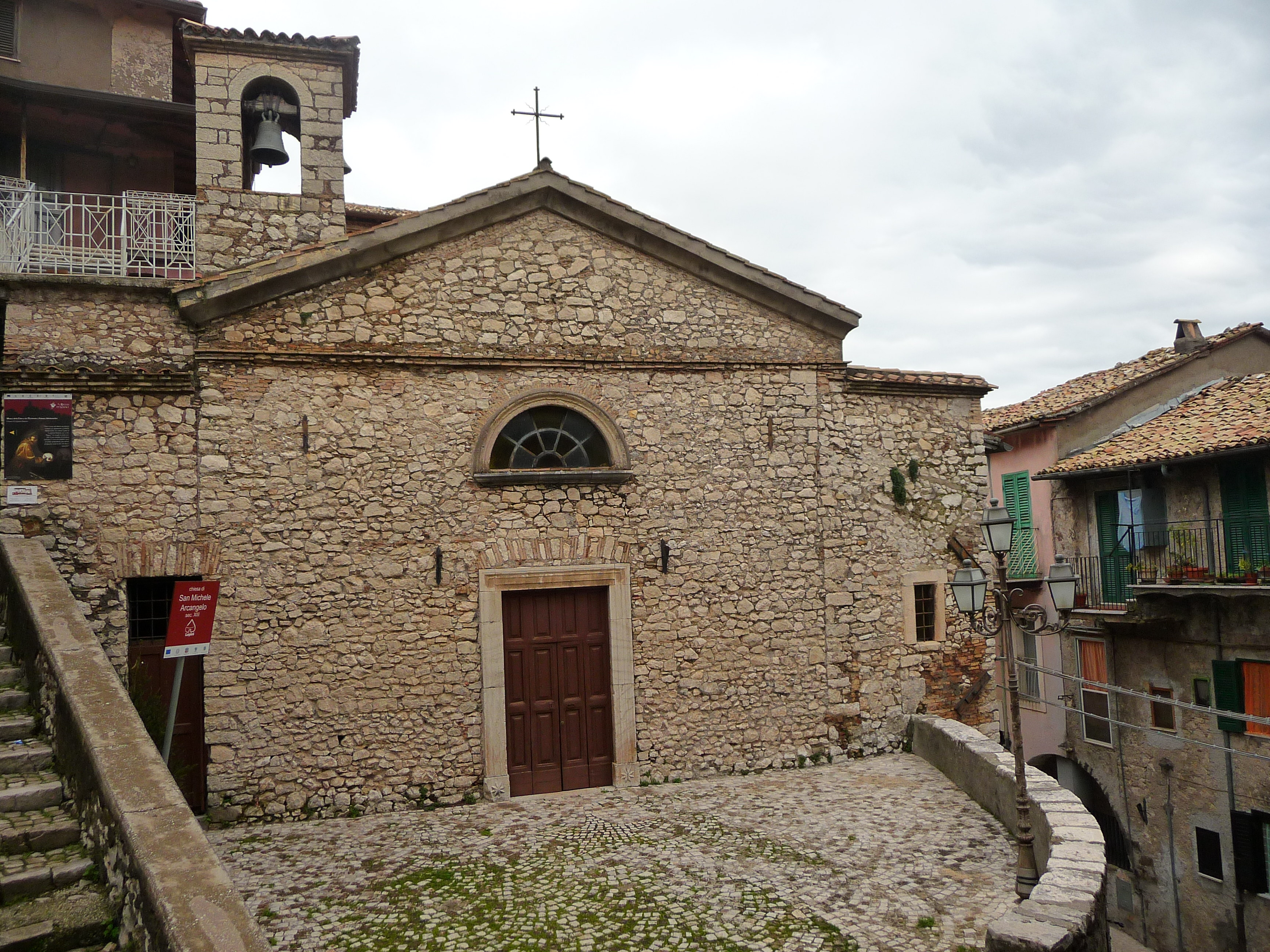 S.Michele?